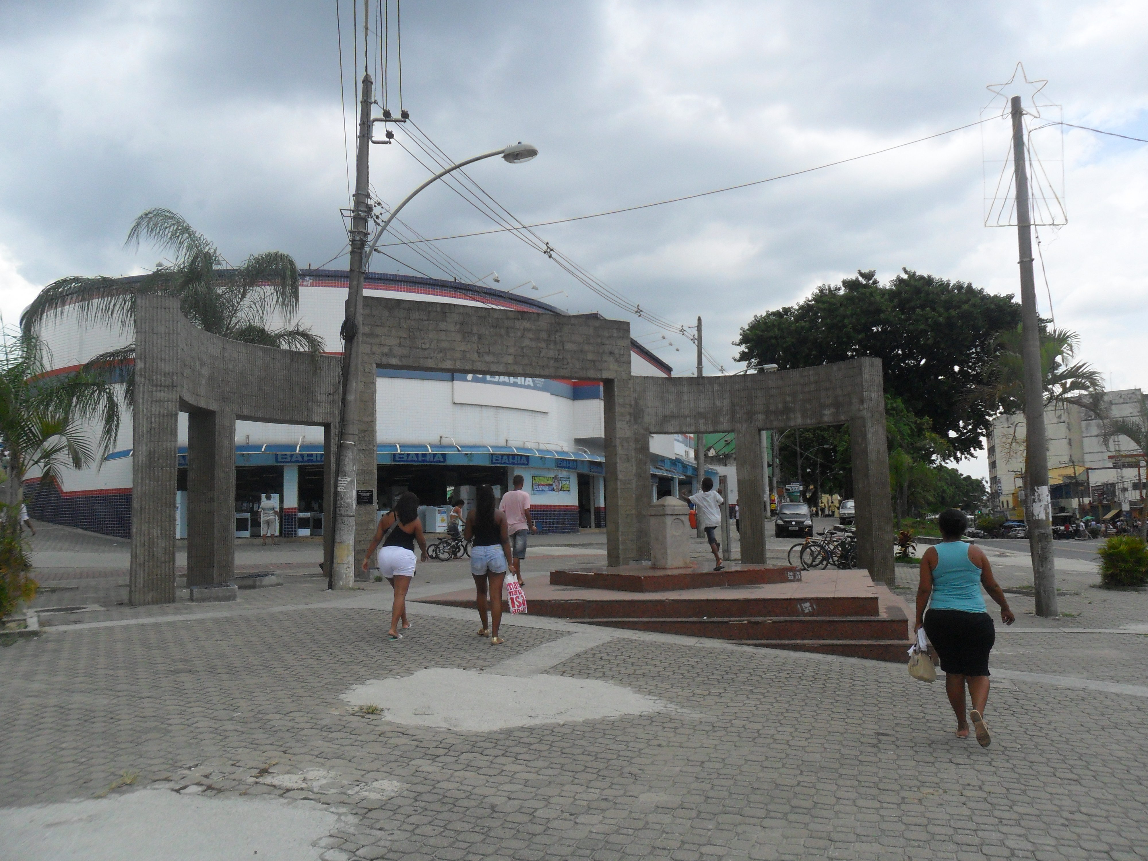 Um marco no Caminho Imperial, em Santa Cruz, no Rio de Janeiro.